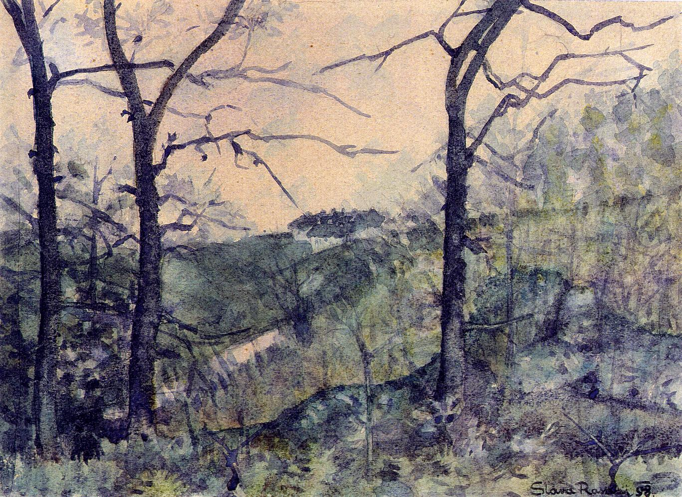 Slava Raškaj, Pogled na ozalj, akvarel, 1898.